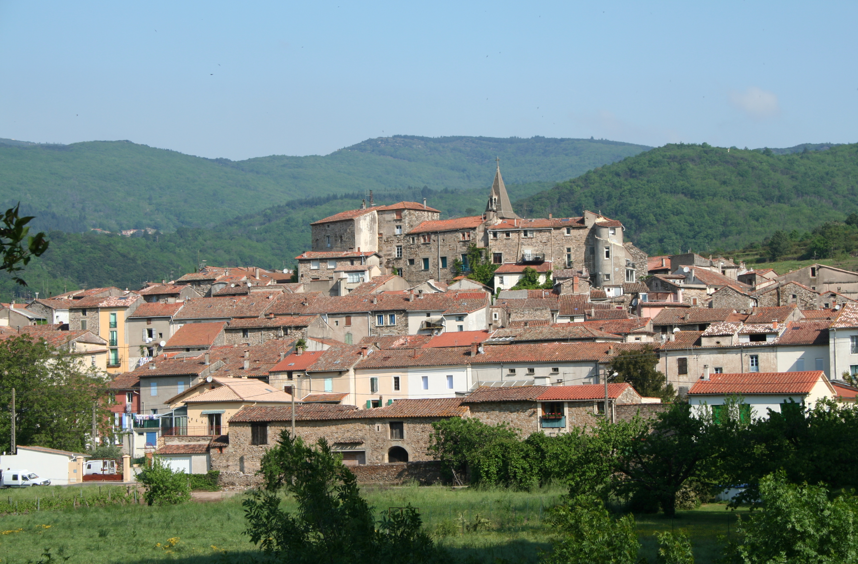 Le Poujol-sur-Orb (Hérault) - vue générale.